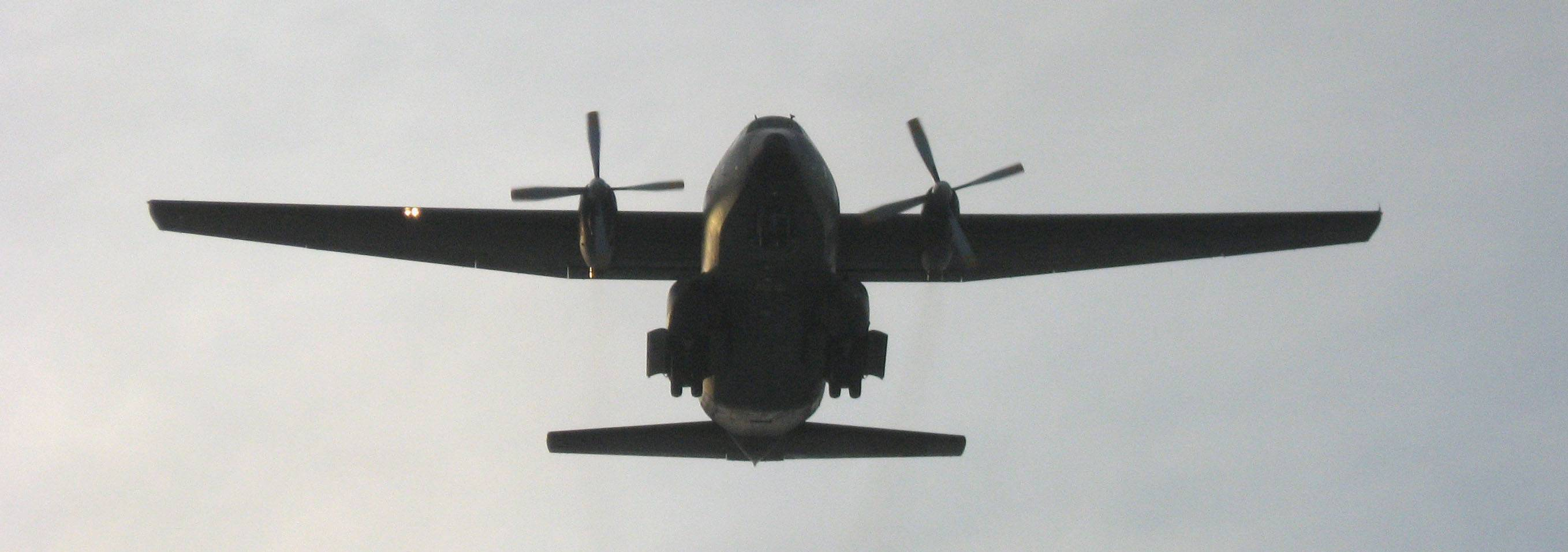 Transall im Landeanflug, Flughafen Penzing